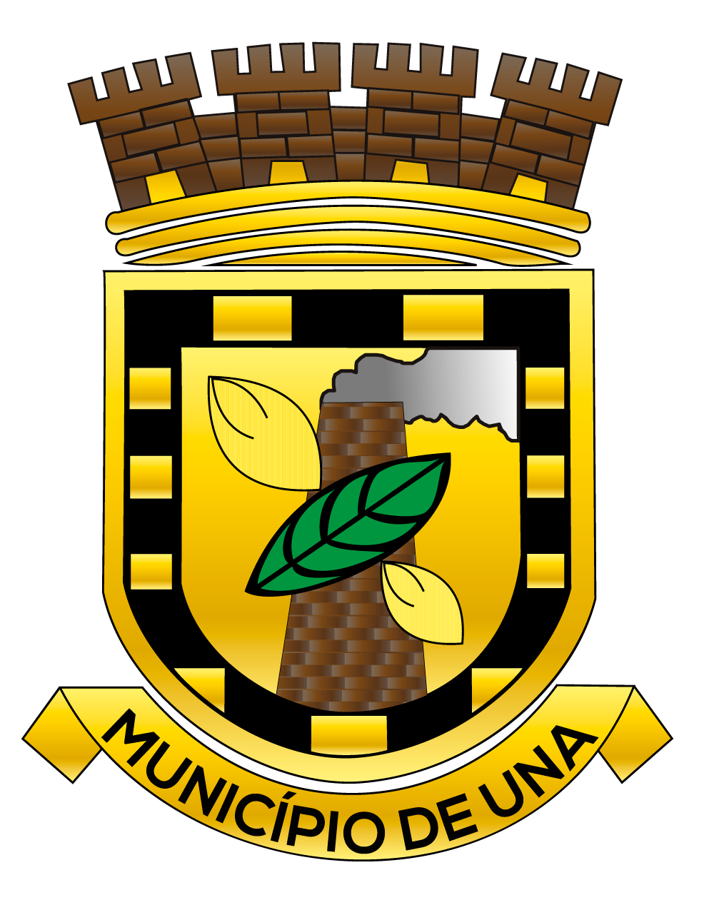 Esse é o brasão do município de Una feito em 2017 por Jairo Soares. Vetorizado no Photoshop